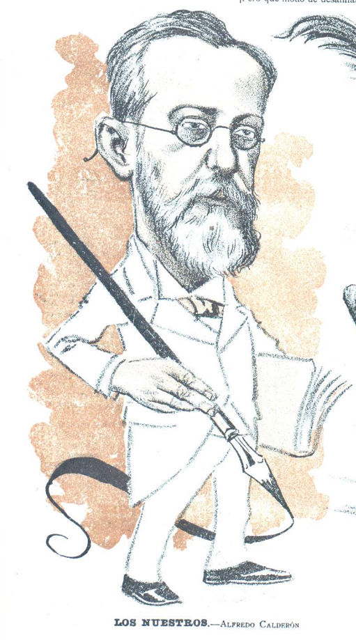 Caricatura.